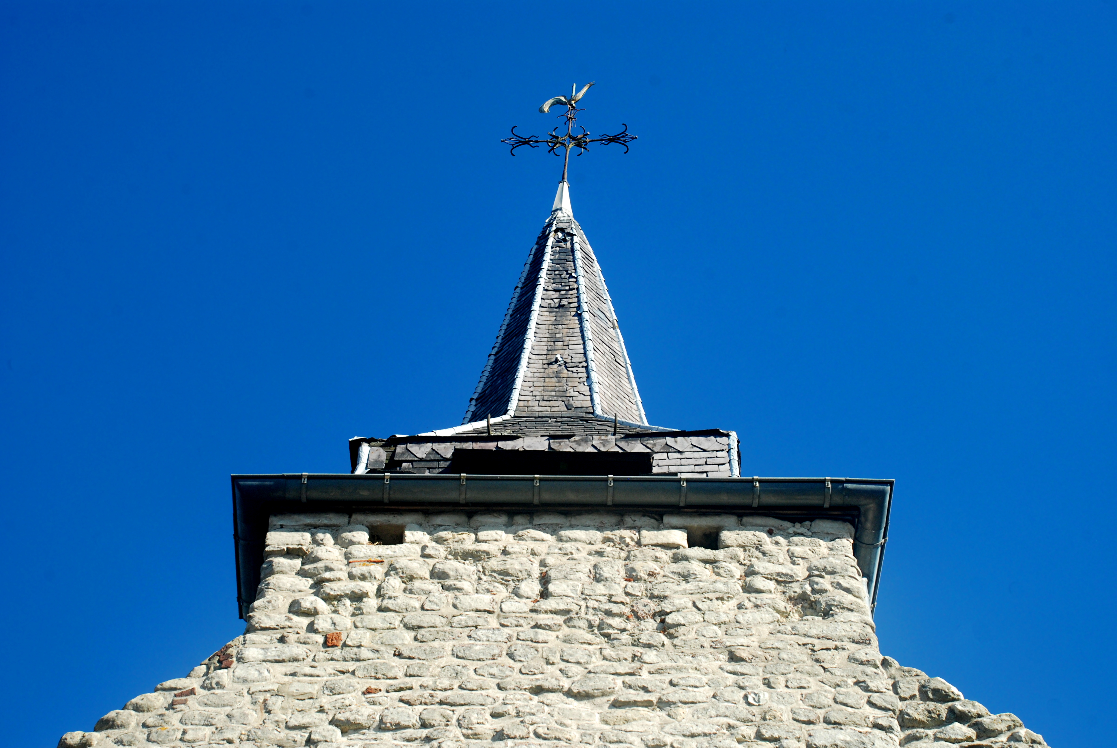 Belgique - Brabant wallon - Nivelles - Eglise Sainte-Marguerite de Thines